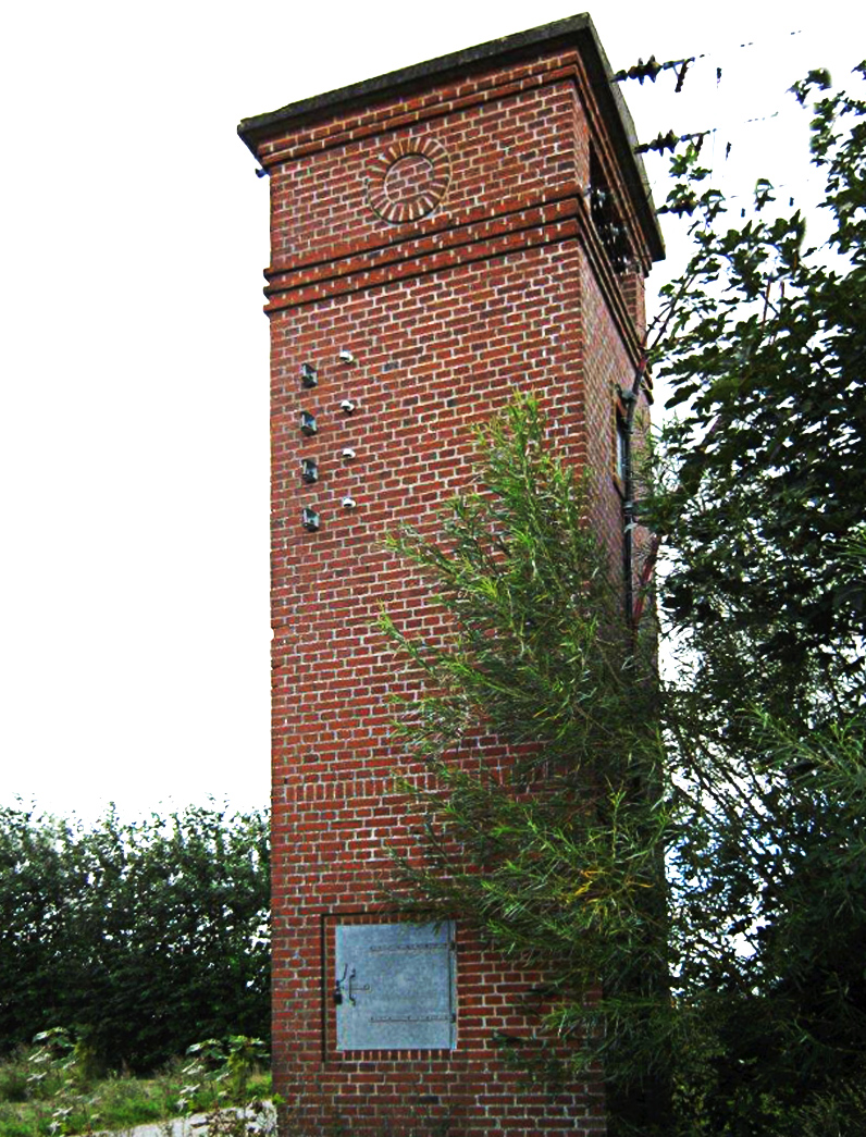 Transformatortårn i Jelling, Danmark.